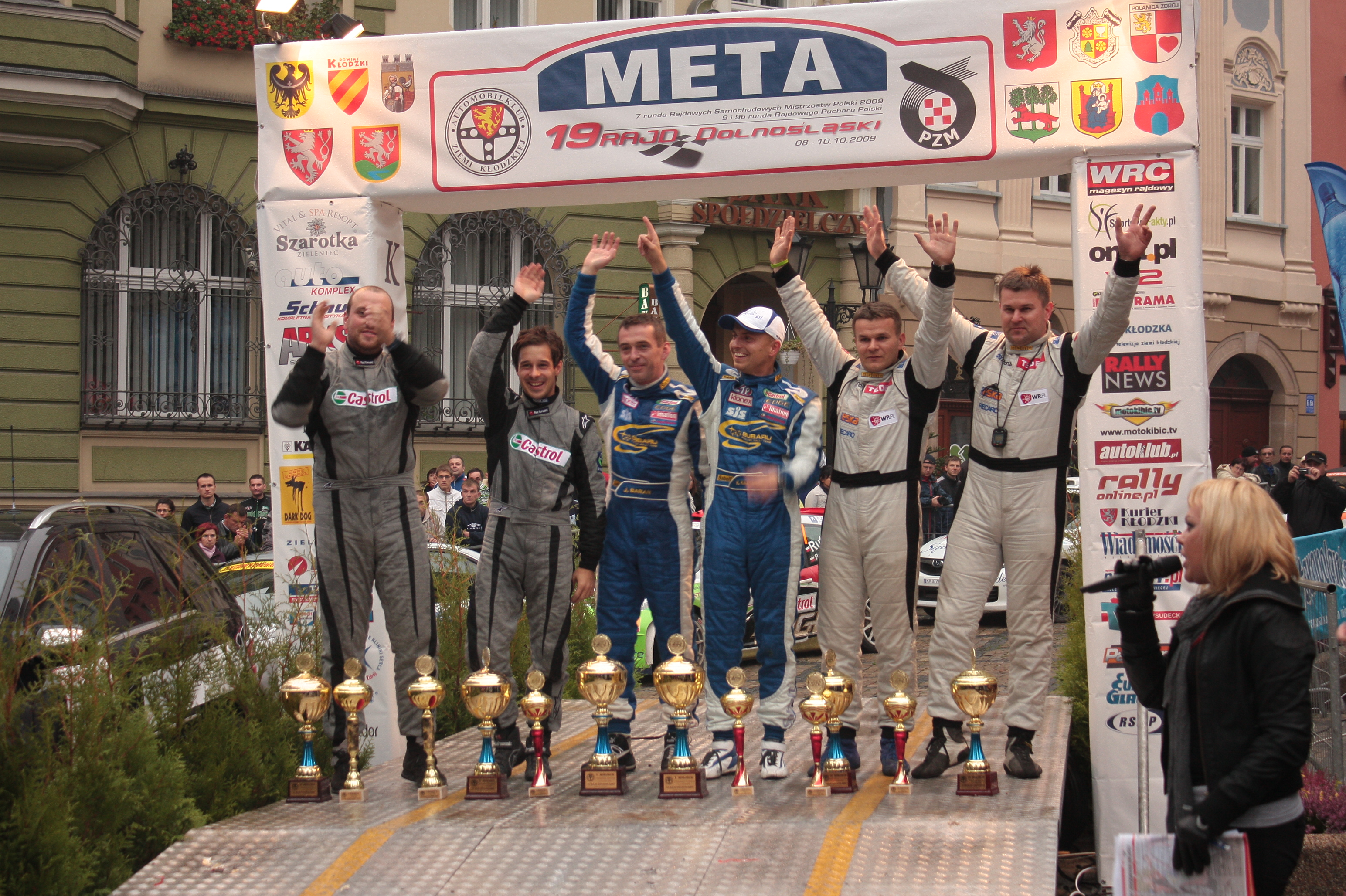 19 Rajd Dolnośląski. Stoją od lewej Andrzej Obrębowski, Maciej Oleksowicz, Jarosław Baran, Kajetan Kajetanowicz, Michał Bębenek, Grzegorz Bębenek